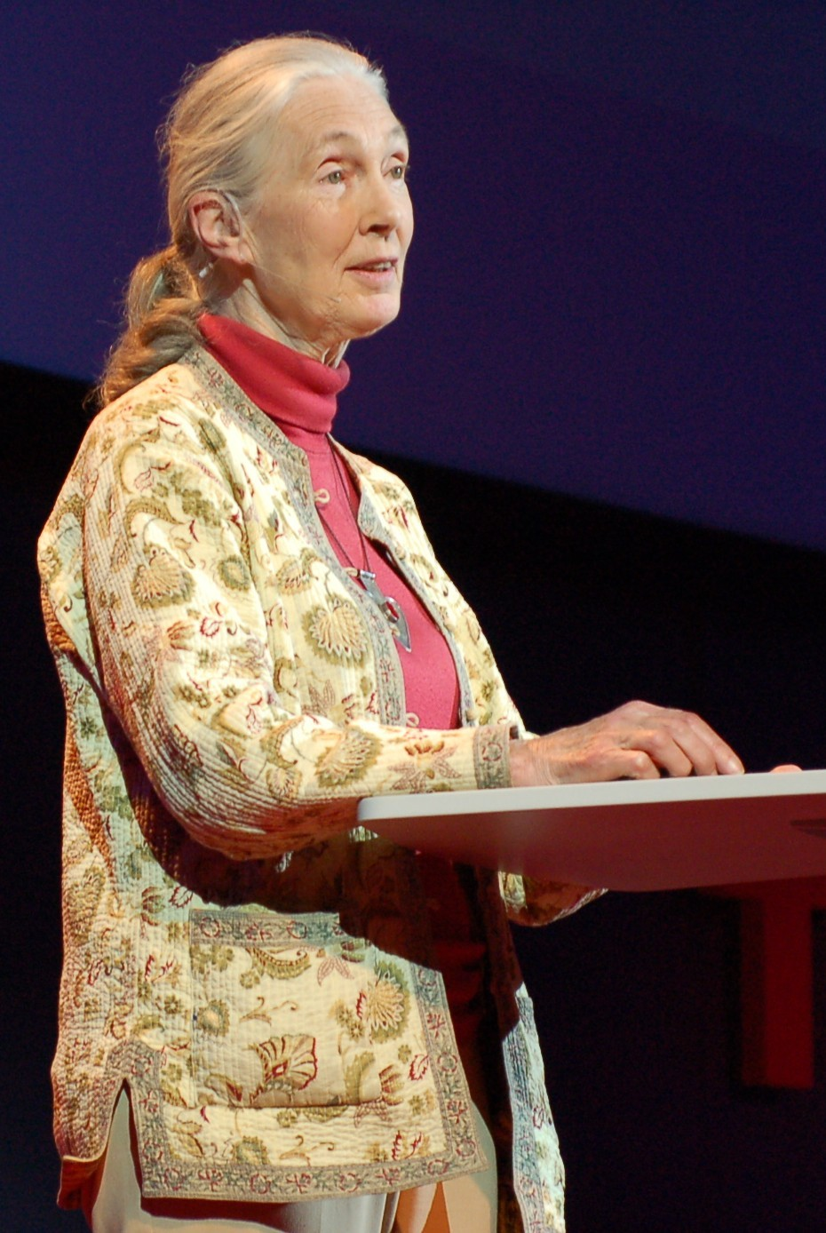 Jane Goodall, britische Verhaltensforscherin, auf der TEDGlobal 2007 in Arusha, Tansania